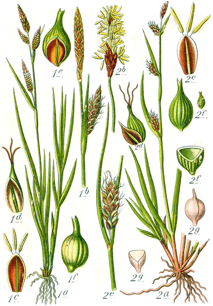 1. Carex × xanthocarpa Degl. ex Loisel. (Carex flava × C. hostiana) 2. Carex distans L. Original Caption 1. Carex flava × hornschuchiana 2. Lücken-Segge, C. distans